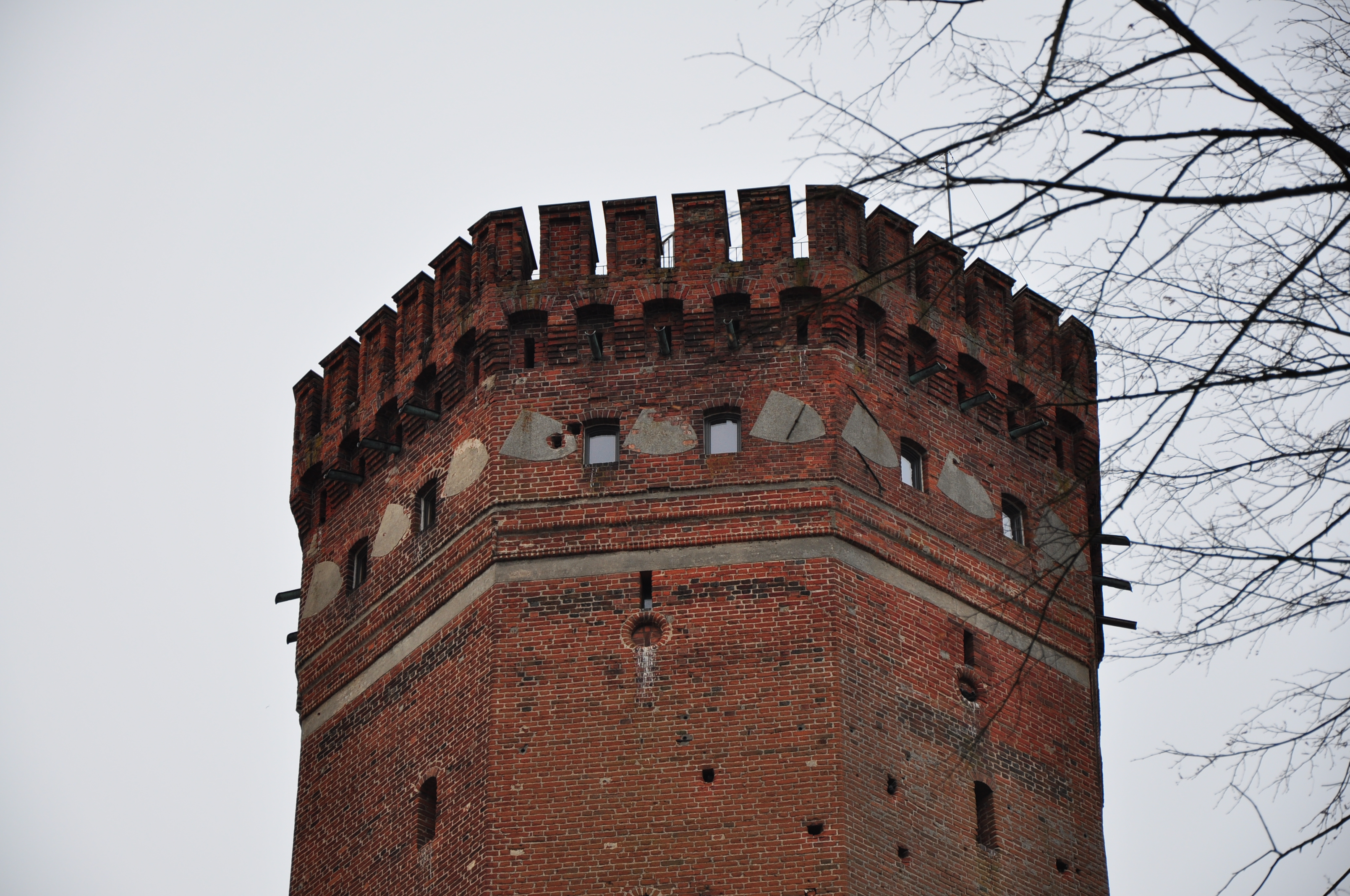 zespół zamku krzyżackiego wraz z parkiem , fosami, starymi murami kamiennymi ul Kościelna, Dworcowa, Parkowa Człuchów, miasto Człuchów